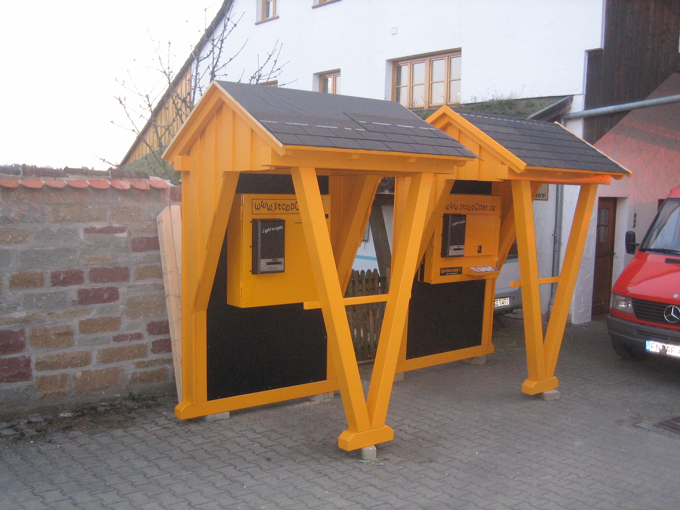 StoppOmat-Bau